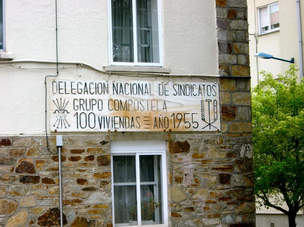 Escudo da Delegación Nacional de Sindicatos en Compostela.